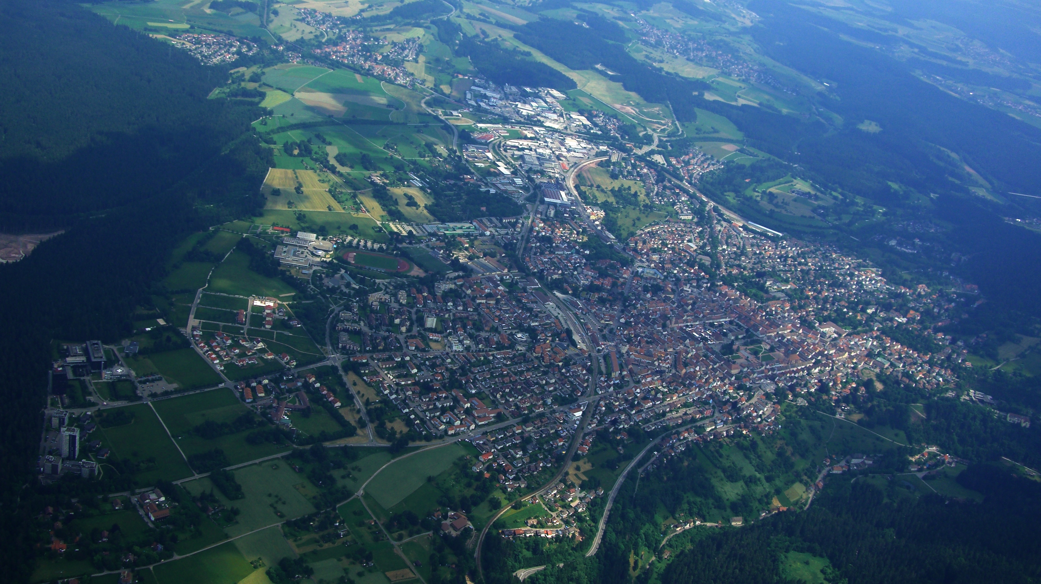 Freudenstadt